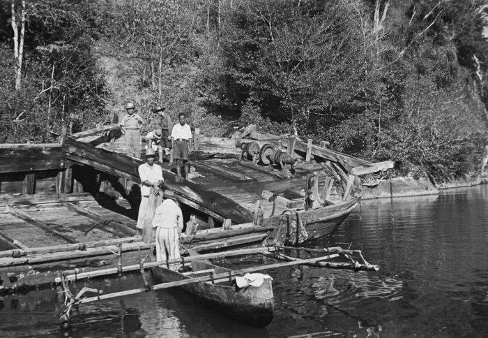 negatief. Gezonken Japans schip, Pulau Lembeh